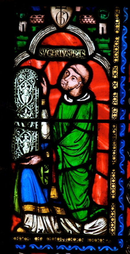 Abt Sugerius von Saint-Denis (+ 1151)